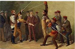 Das Gemälde zeigt eine Nachstellung einer Mensur.